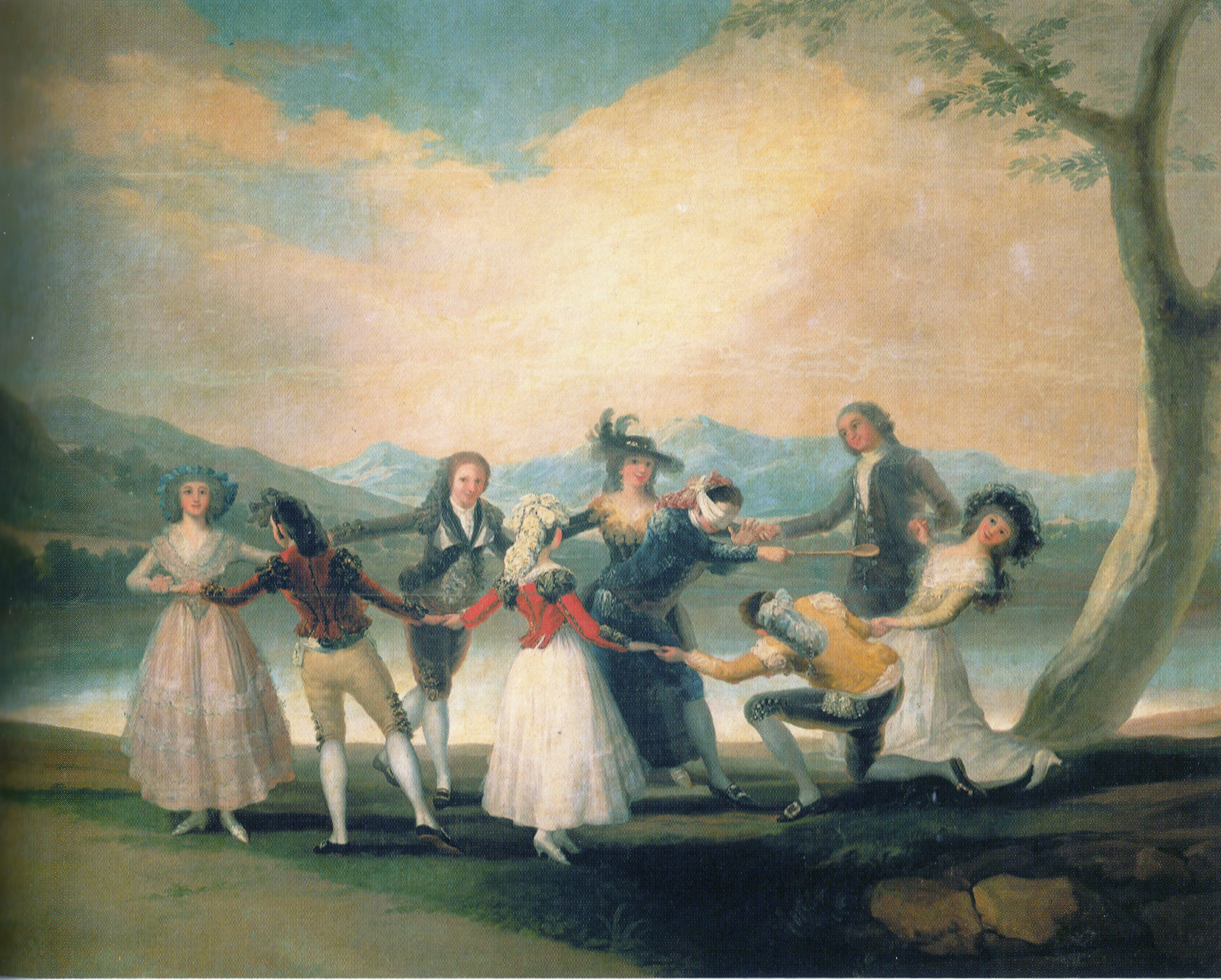 detail